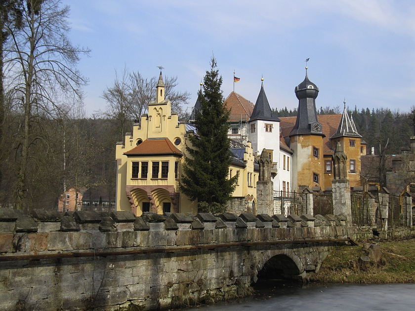 Jagdschloss zur Fröhlichen Wiederkunft in Wolfersdorf bei Stadtroda